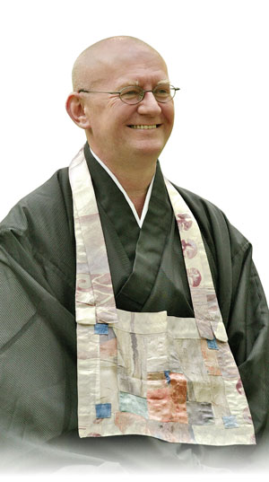 Sandó Kaisen